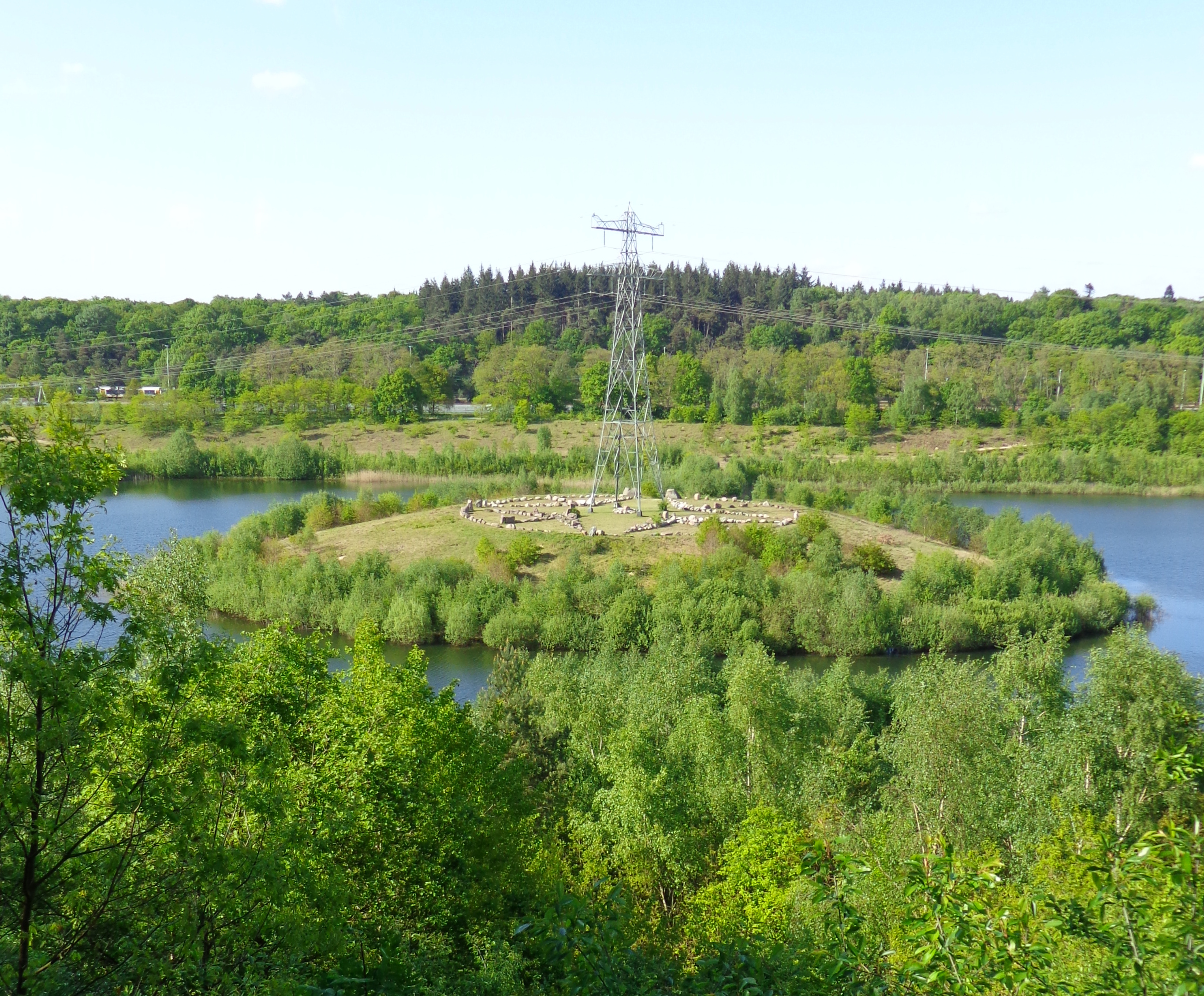 Zwerfsteneneiland in de Zanderij te Maarn gezien vanaf het uitzichtpunt This is a photo or sound file made in Utrechtse Heuvelrug National Park in the Netherlands, with the main subject of the file in the category: landscapes